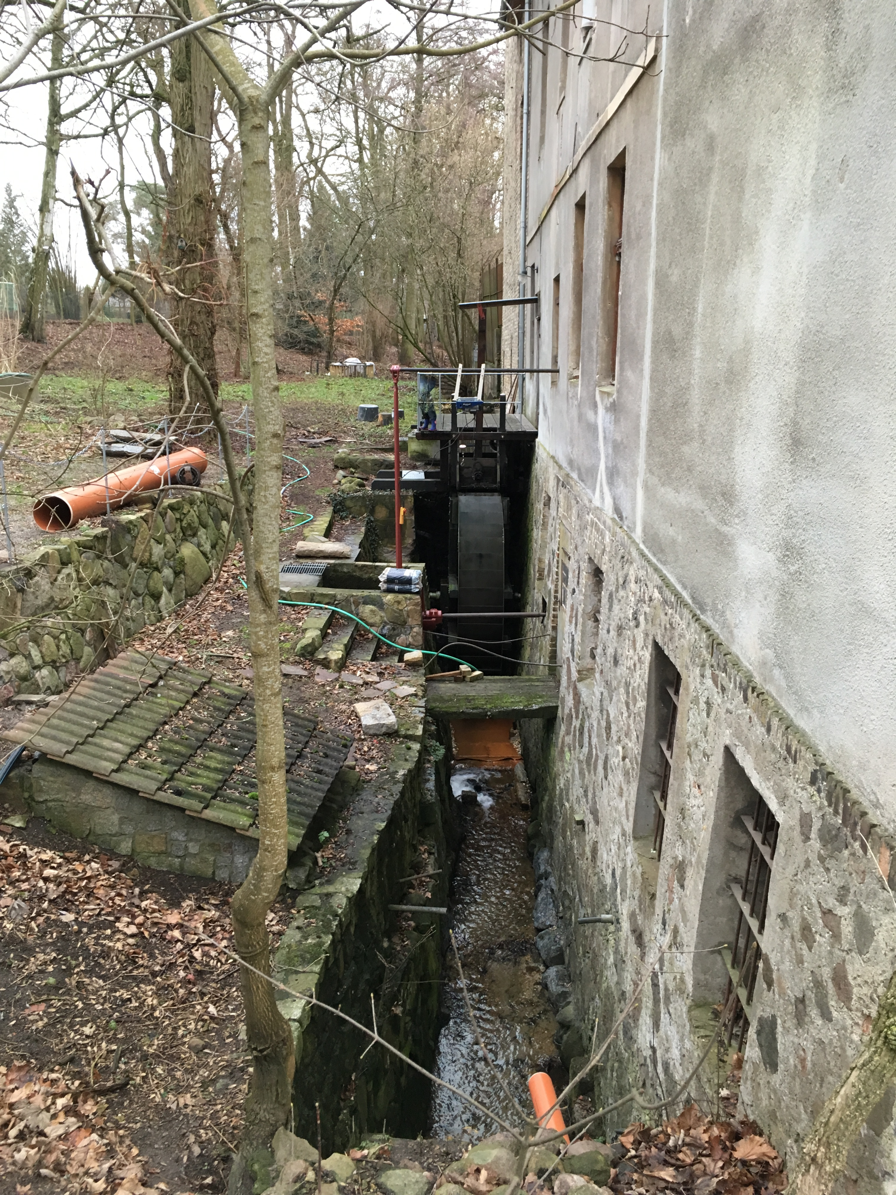 Die Mühle in Hennickendorf entstand im Jahr 1798 als Walkmühle. Sie steht in Rüdersdorf bei Berlin in Brandenburg.